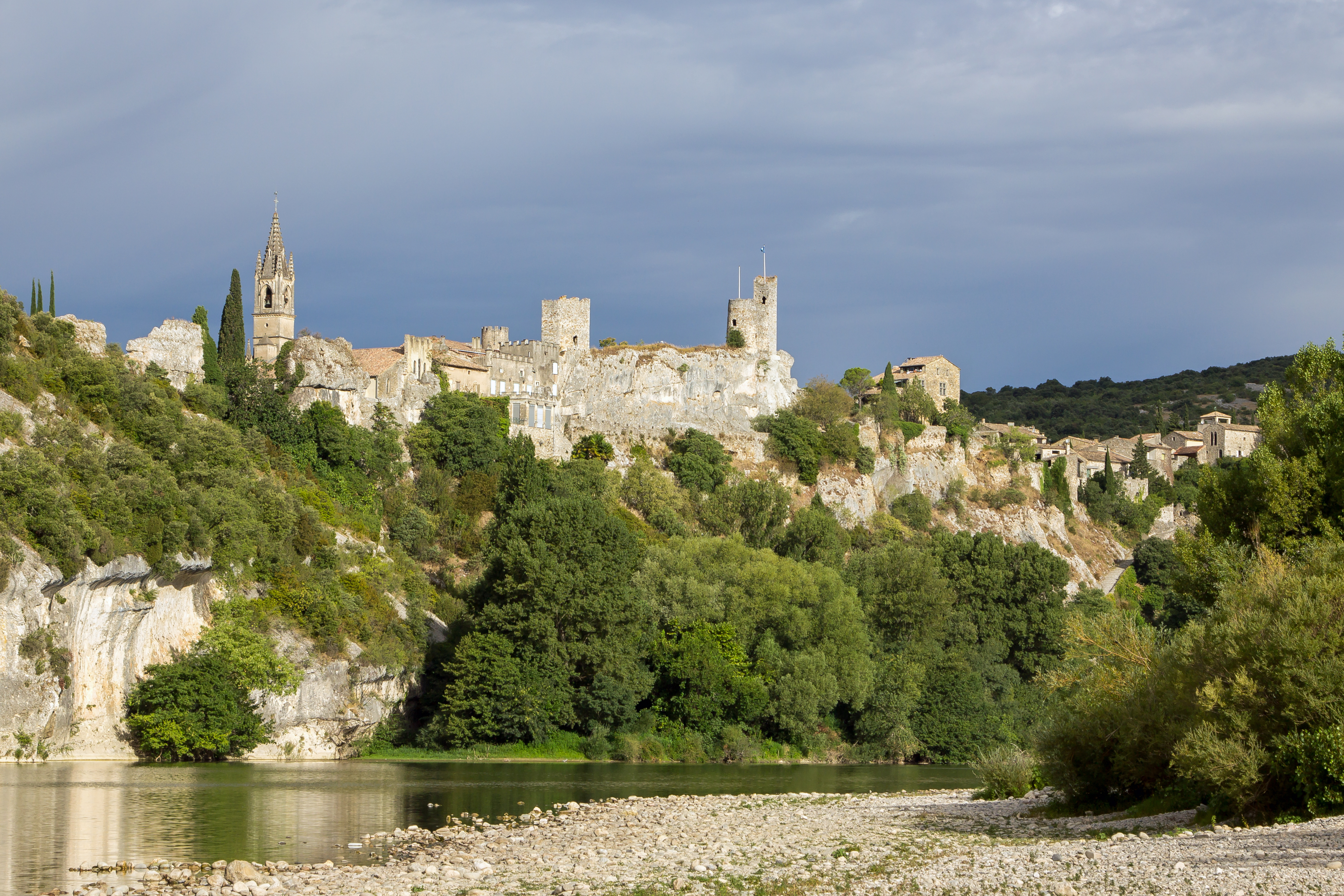 Blick von Saint-Martin-d'Ardèche nach Aiguèze